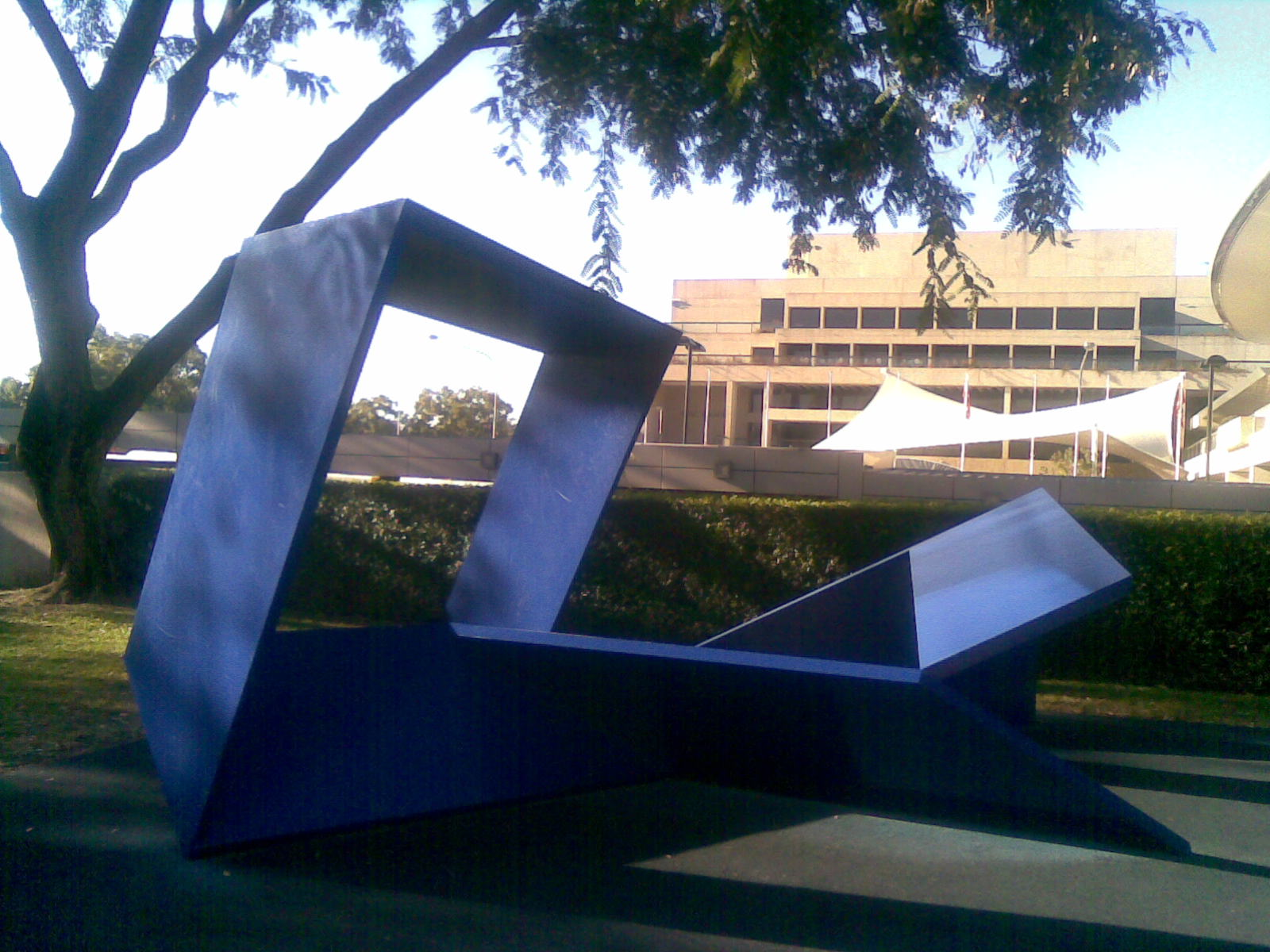 Posted via email from @djackmanson